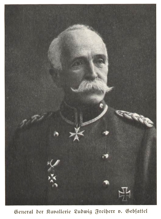 Ludwig von Gebsattel (1857-1930), Bayerischer Adeliger und General der Kavallerie